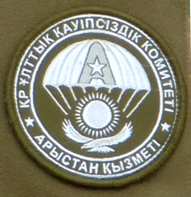 Нарукавный знак бойцов отряда специального назначения "Арыстан" КНБ РК